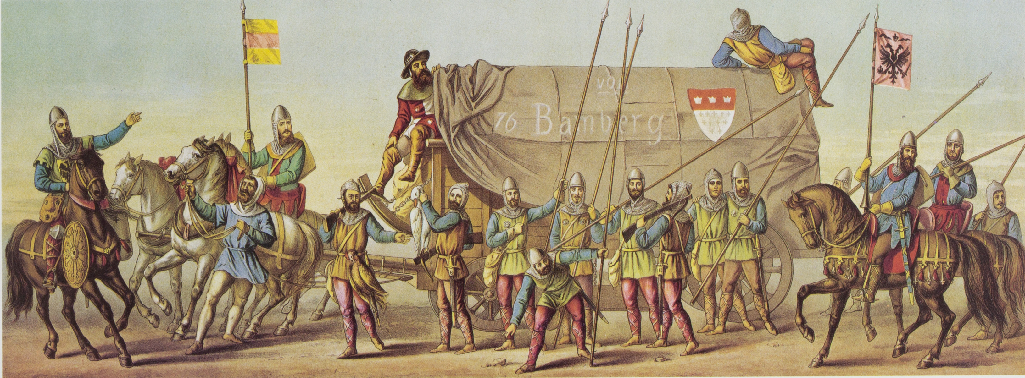 Tony Avenarius: Historischer Festzug veranstaltet bei der Feier der Vollendung des Kölner Doms am 18. October 1880. Tafel XVI